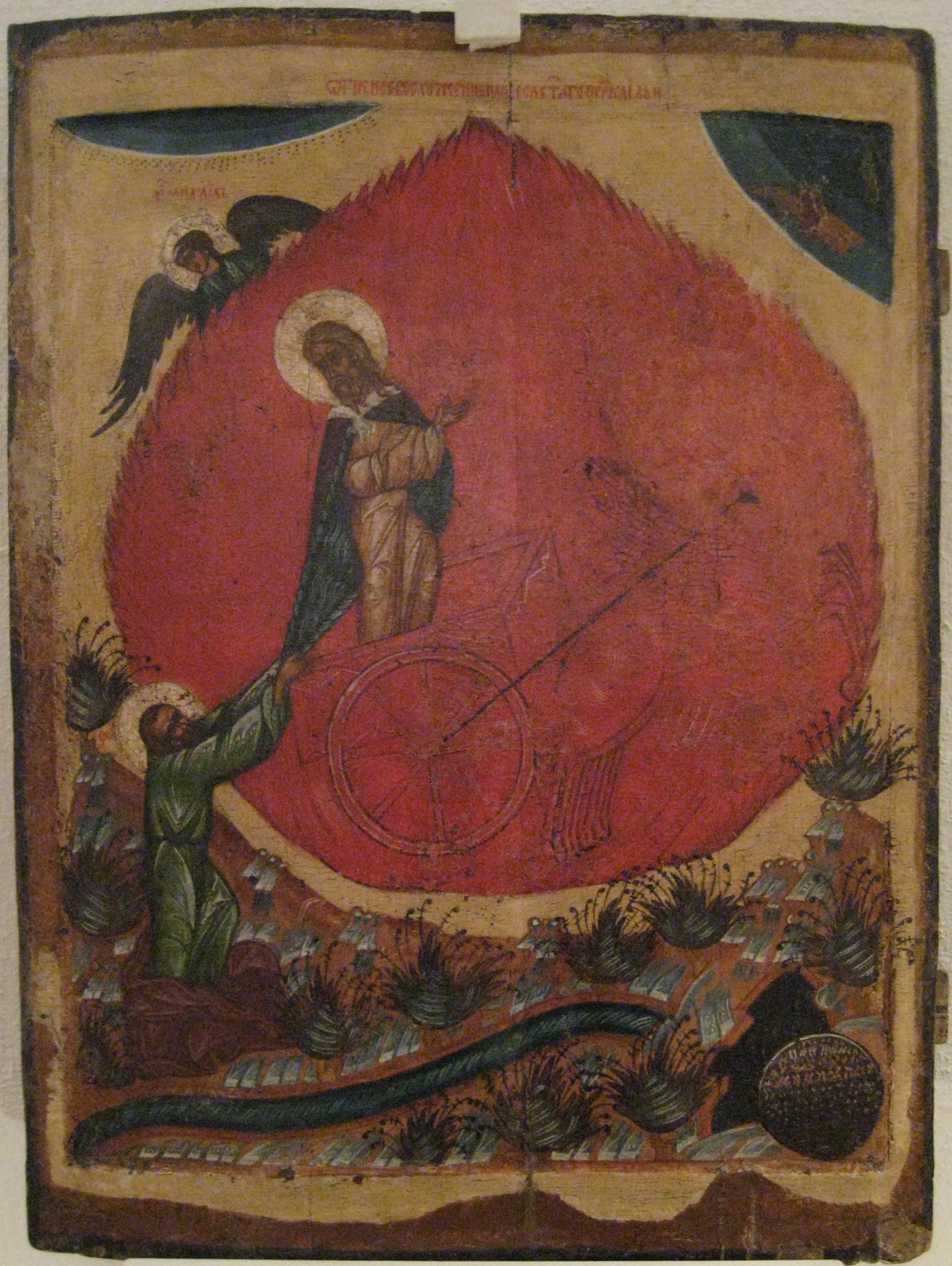 Elijah's firey ascent into heaven. Огненное восхождение Ильи-пророка в небеса. Pskov School